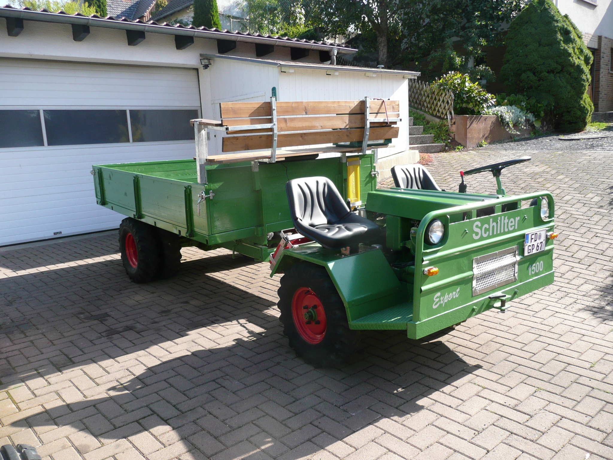 Schilter Export 1500 Baujahr 1967 Mit Lombardin 2 Zylinder Diesel 22 PS